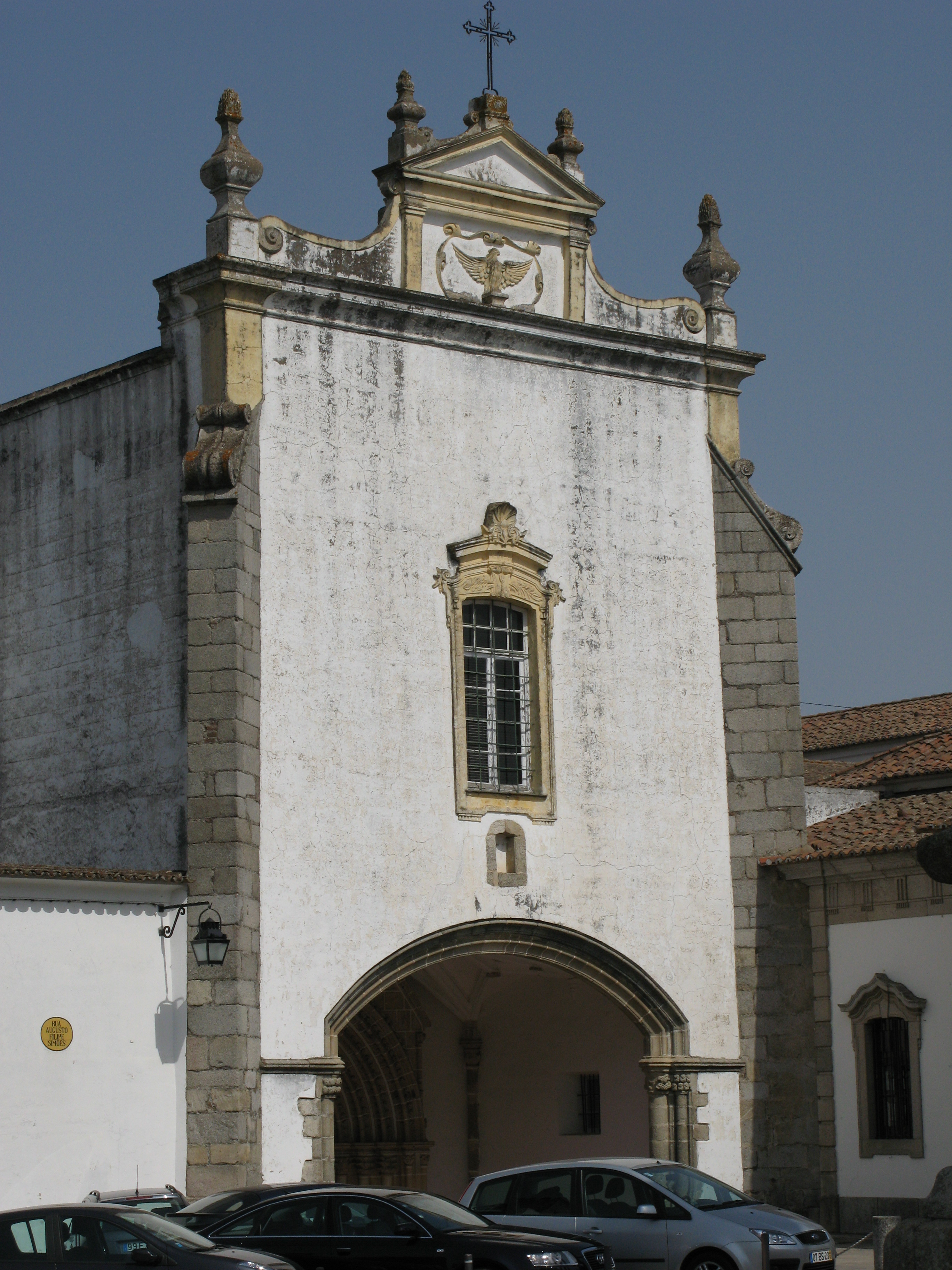 Lóios Church in Évora, Portugal